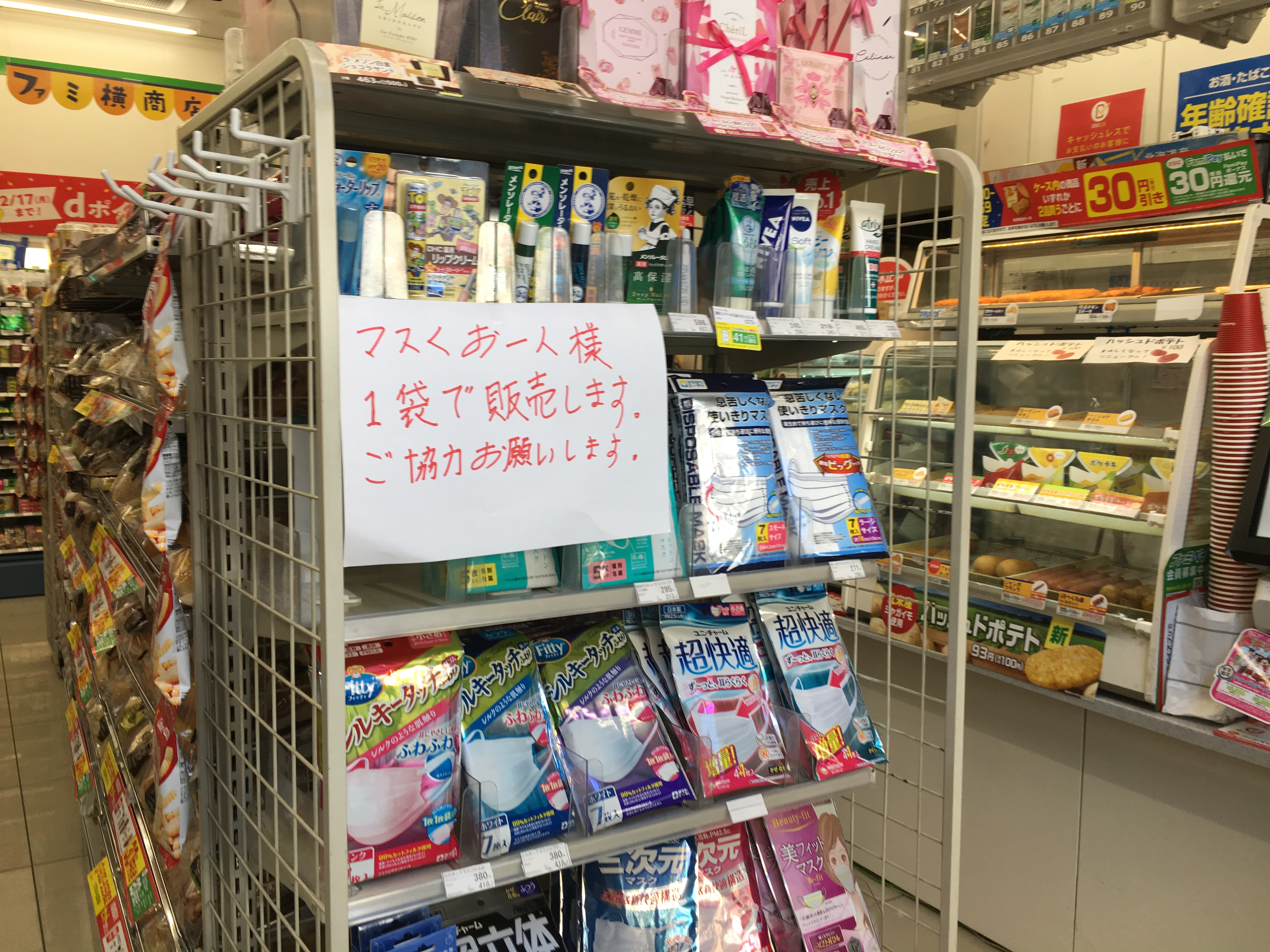 日本国内で新型コロナウイルスの感染が拡大して行く中、マスクの販売制限が行われた。